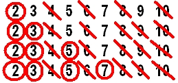 Eratosthenes såll på talen 1-10 (ja, jag har tråkigt)